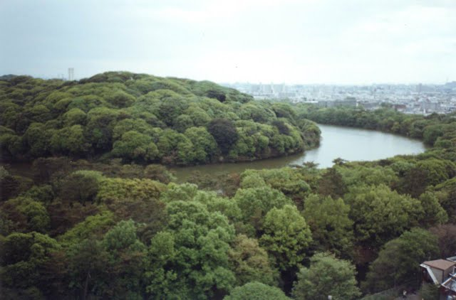 Могильный курган императора Нинтоку